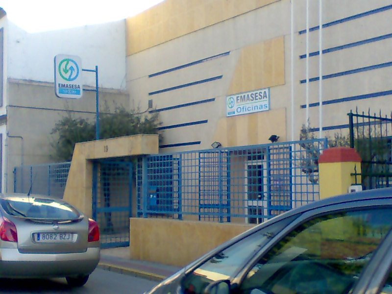 oficinas de Emasesa en Dos Hermanas (Sevilla)